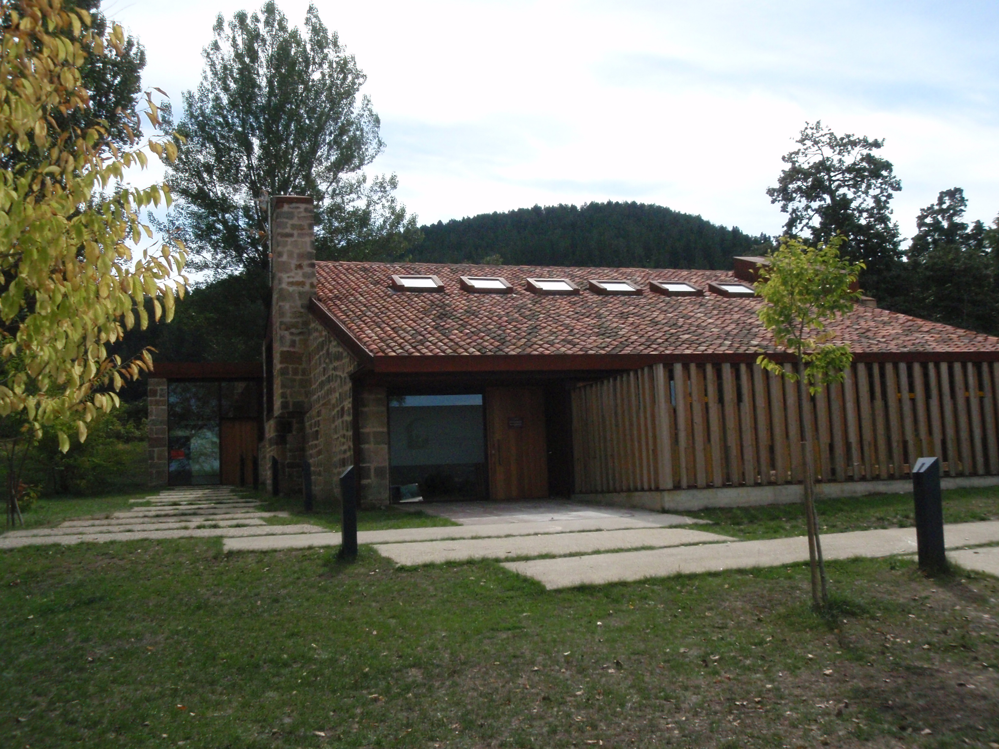 Vista del exterior del Centro de Interpretación del Rupestre en Valderredible, Santa María de Valverde (Cantabria)